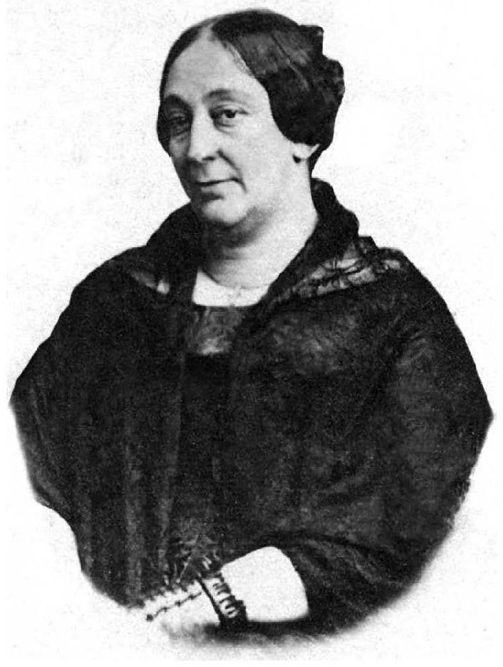 Retrato (circa 1860) de Mercedes Marín del Solar (1804-1866), educadora y poetisa chilena. (Colección Museo Histórico Nacional)